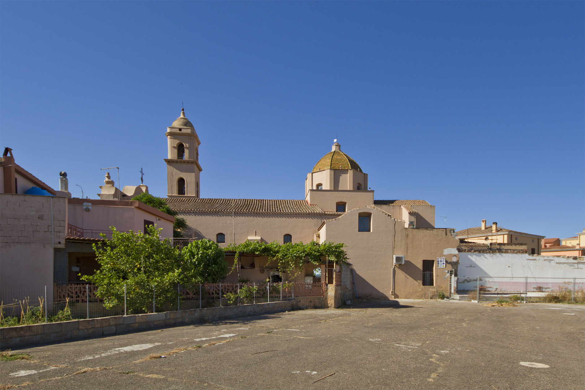 Cattedrale Sant'Andrea, Tortolì, Ogliastra, Sardinia, Italy